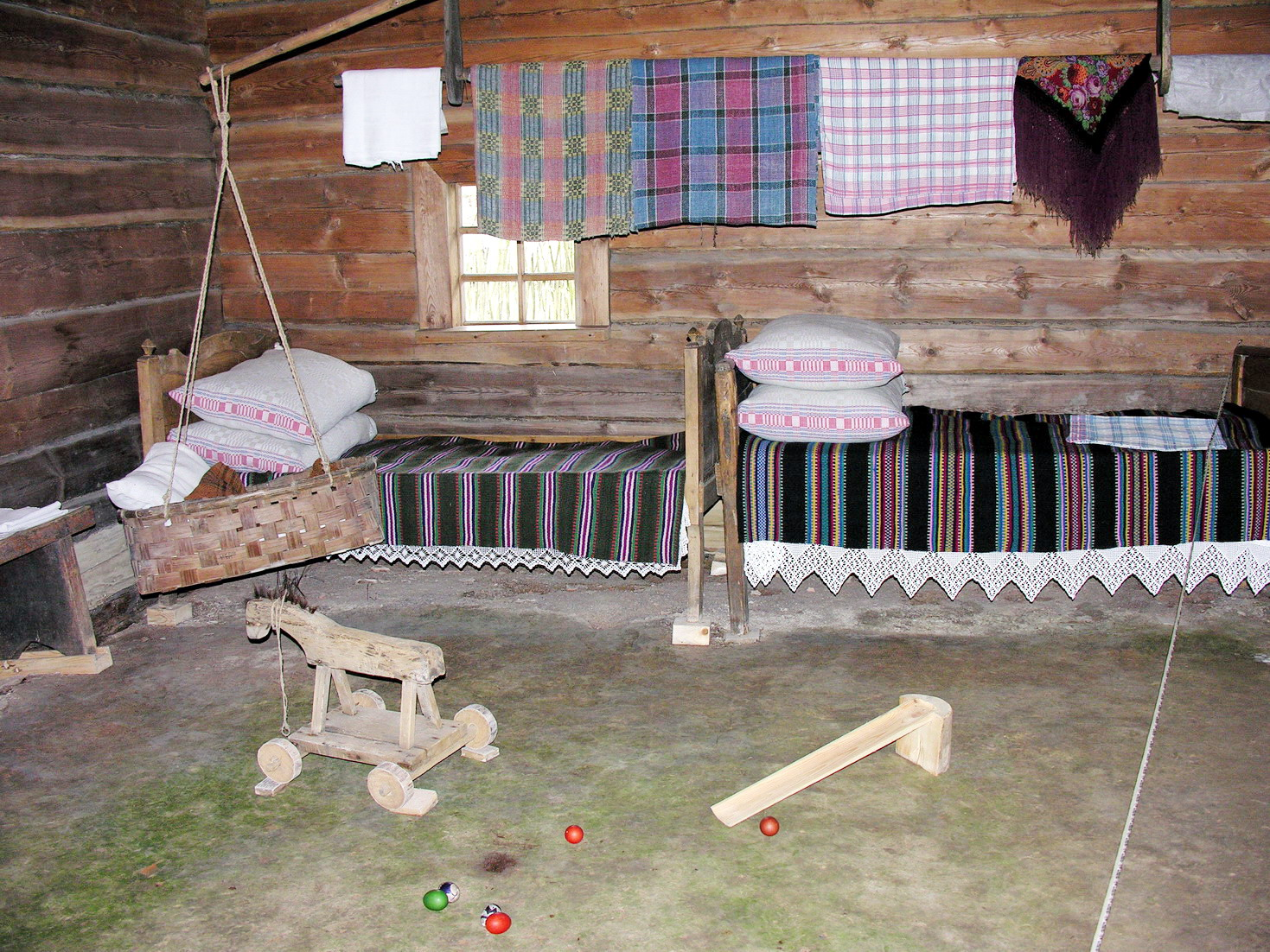 Pirkia, vidus 2007 m. balandžio 21 d., Lietuva